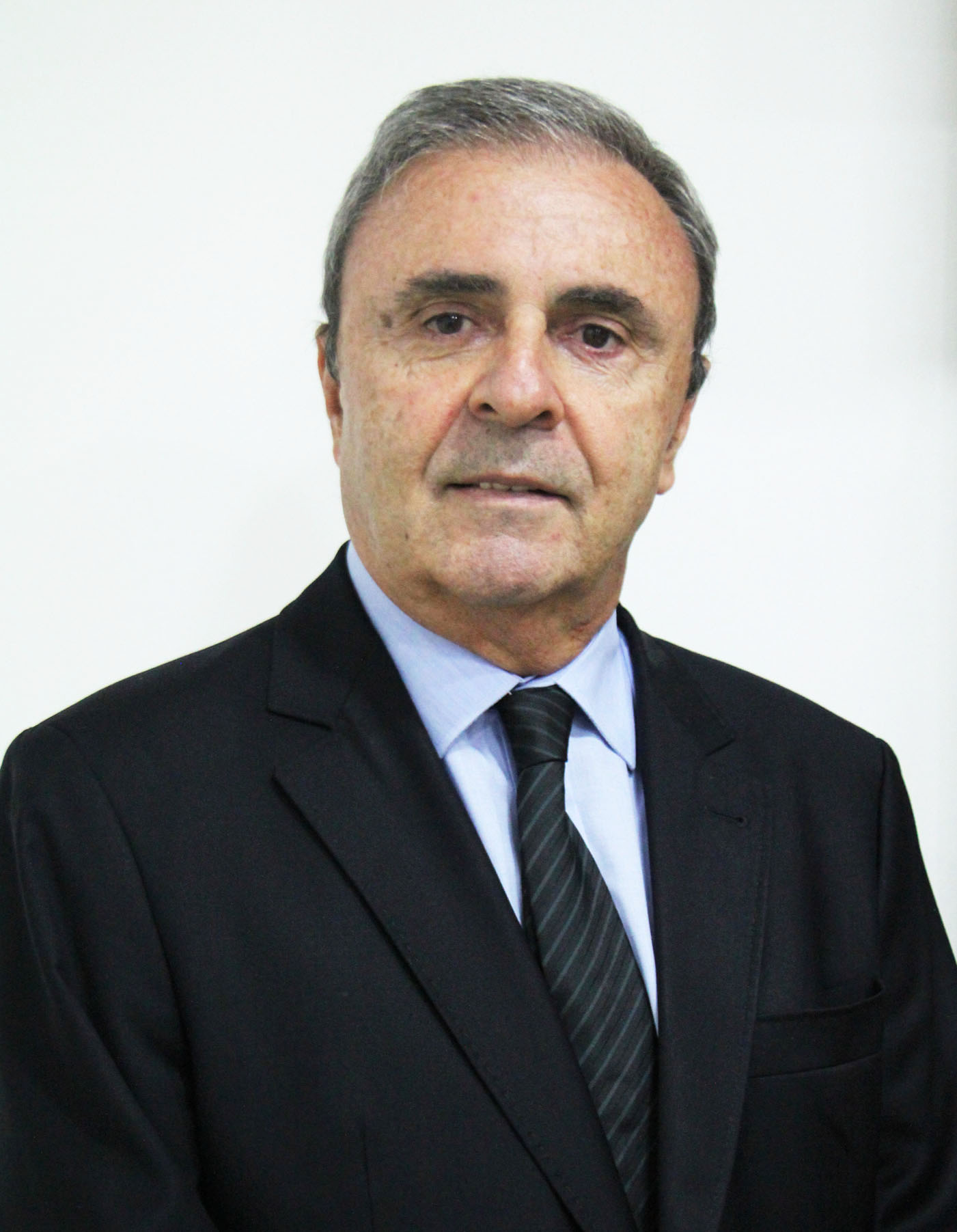 Foto perfil